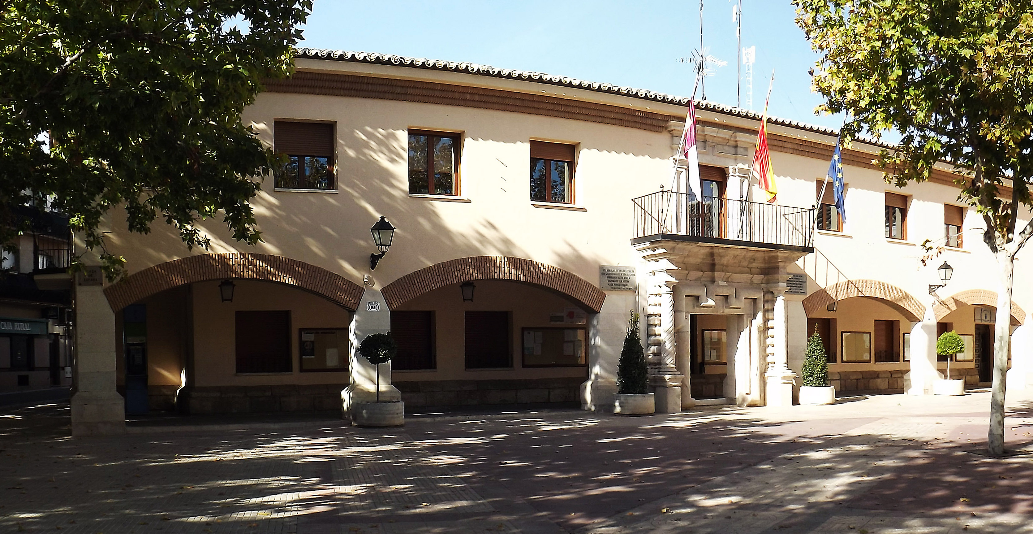 Ayuntamiento de Villacañas